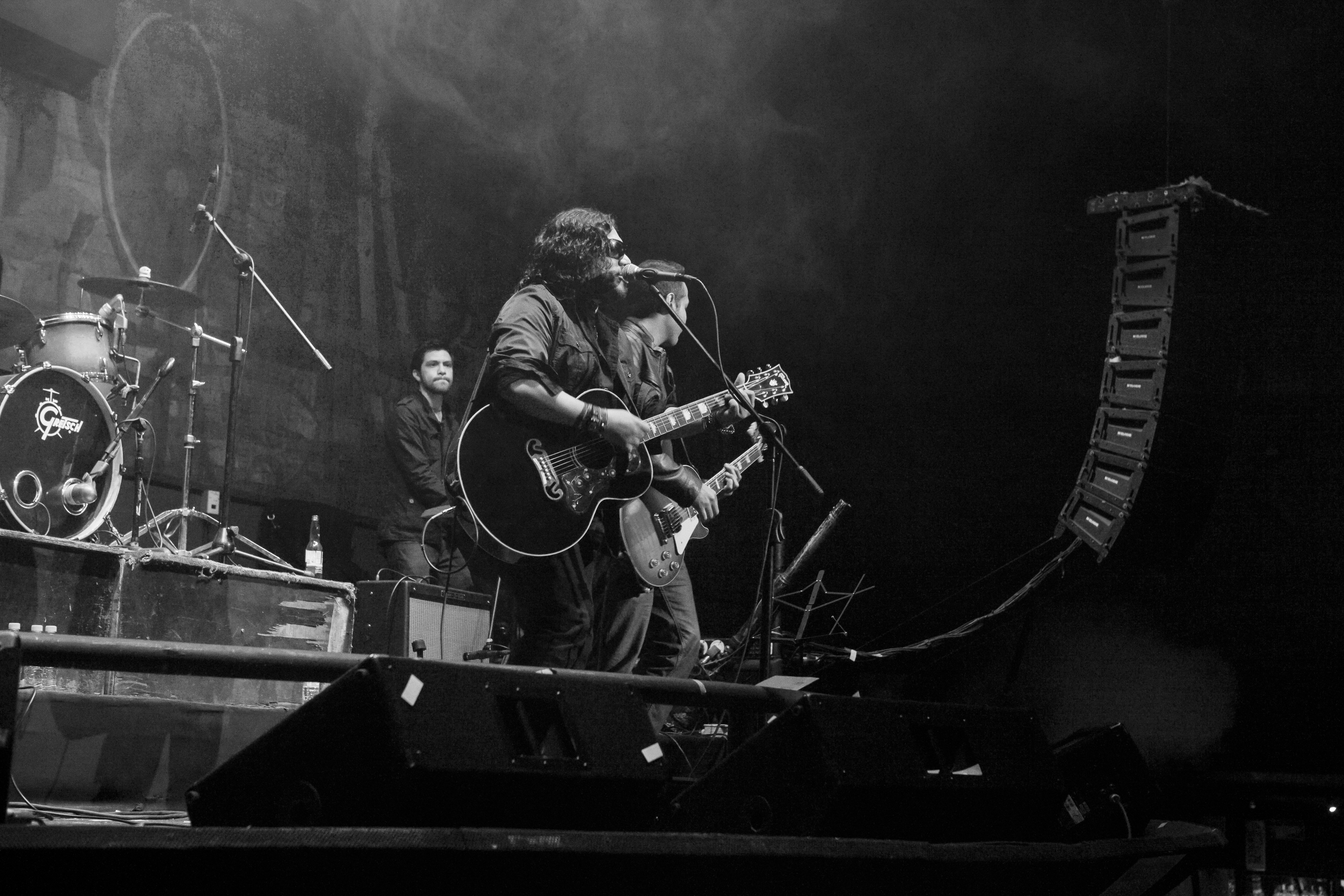 Entre sus éxitos más sonados está "La vida no es la misma sin fútbol"